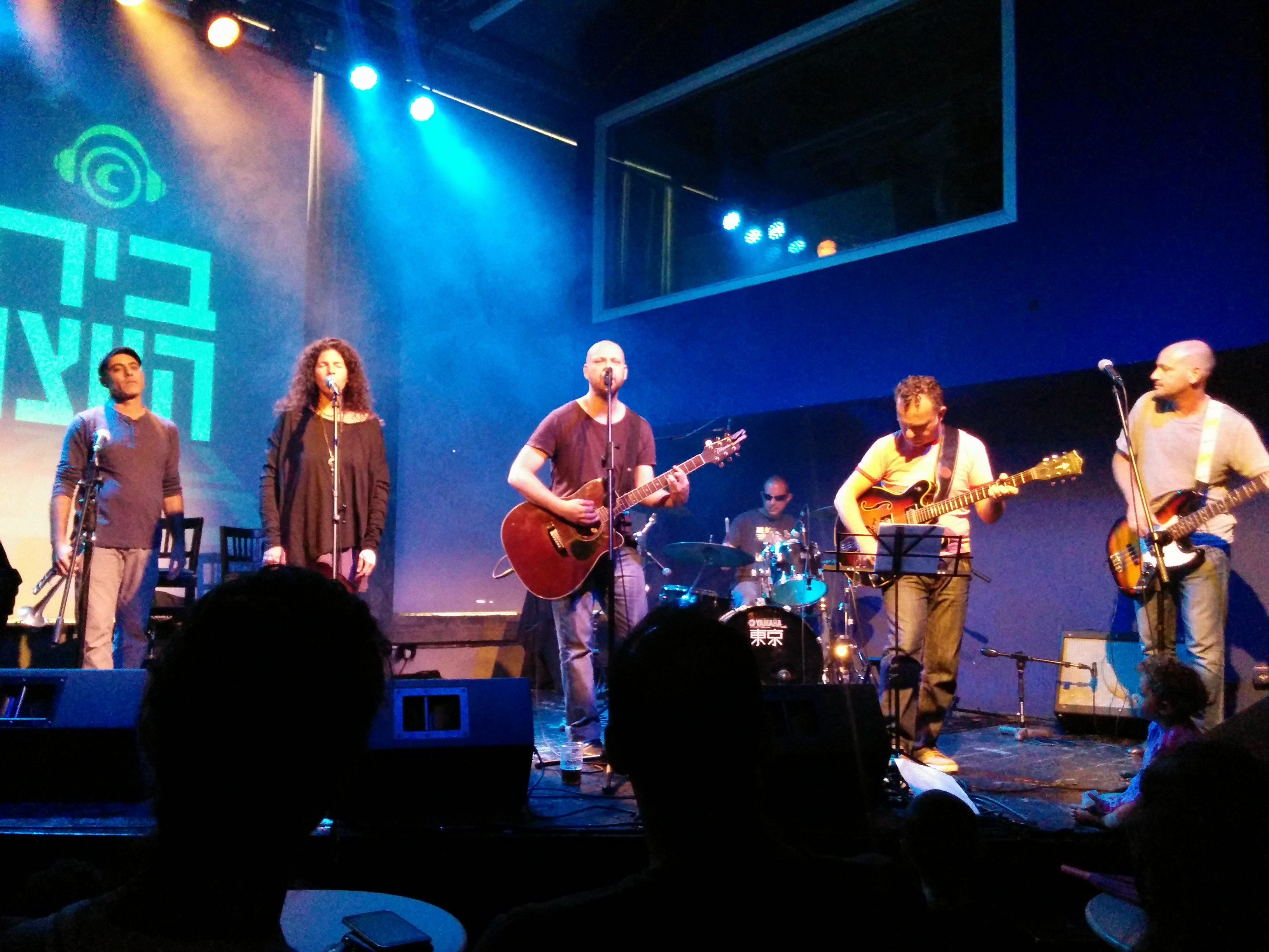 להקת האנשים בהופעה בבית היוצר ב-31 באוקטובר 2014